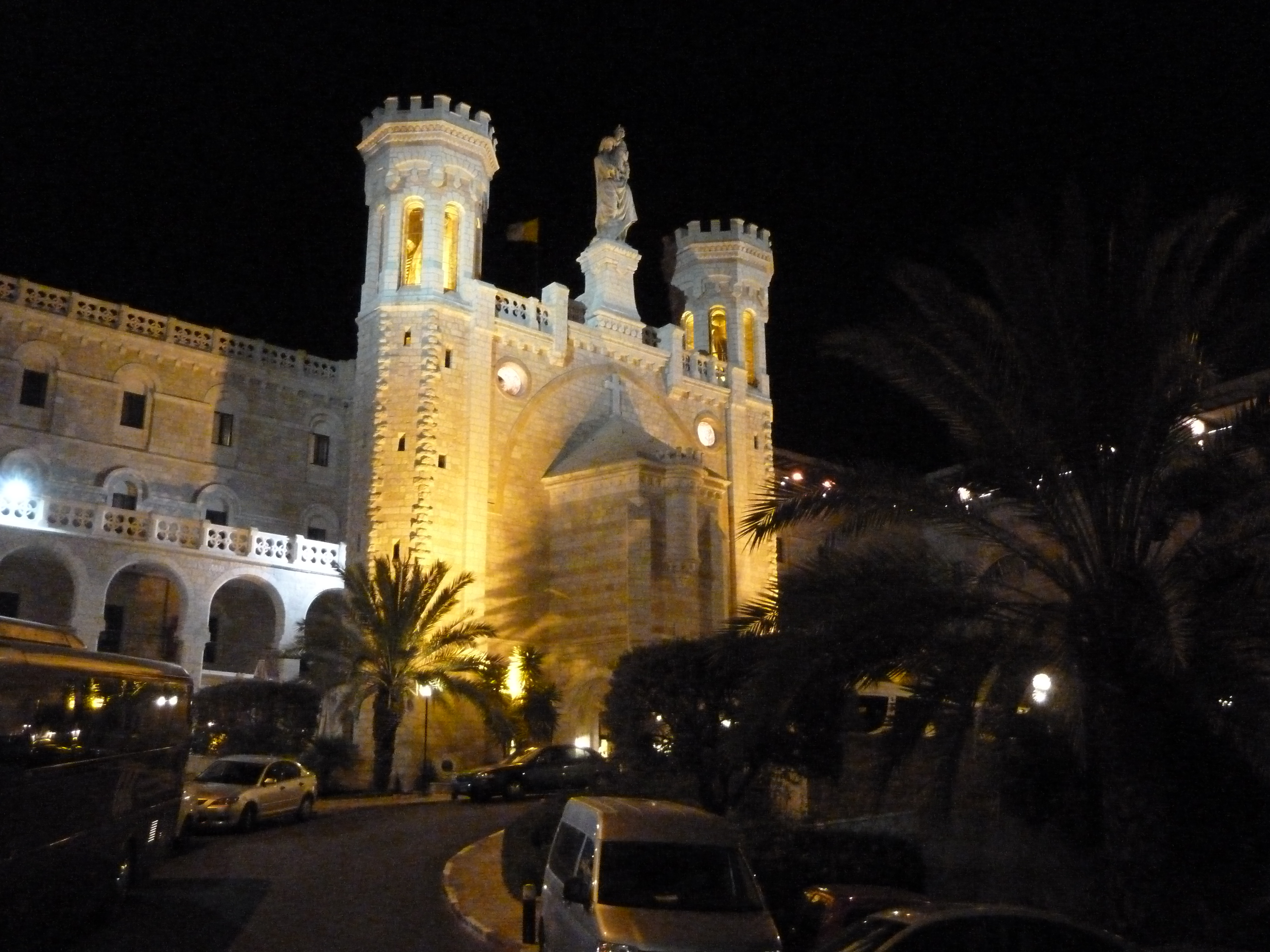 Jerusalem Notre Dame de France night